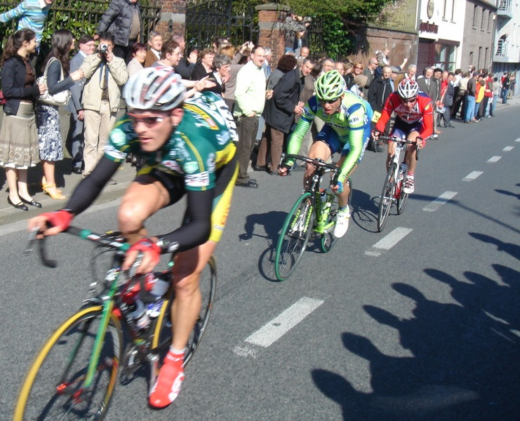 ronde van vlaanderen, doortocht in Lendelede. Jan Kuyckx (landbouwkrediet); Aleksandr Kuschynski (Liquigas); Evert Verbist (Chocolade Jacques - Topsport Vlaanderen)